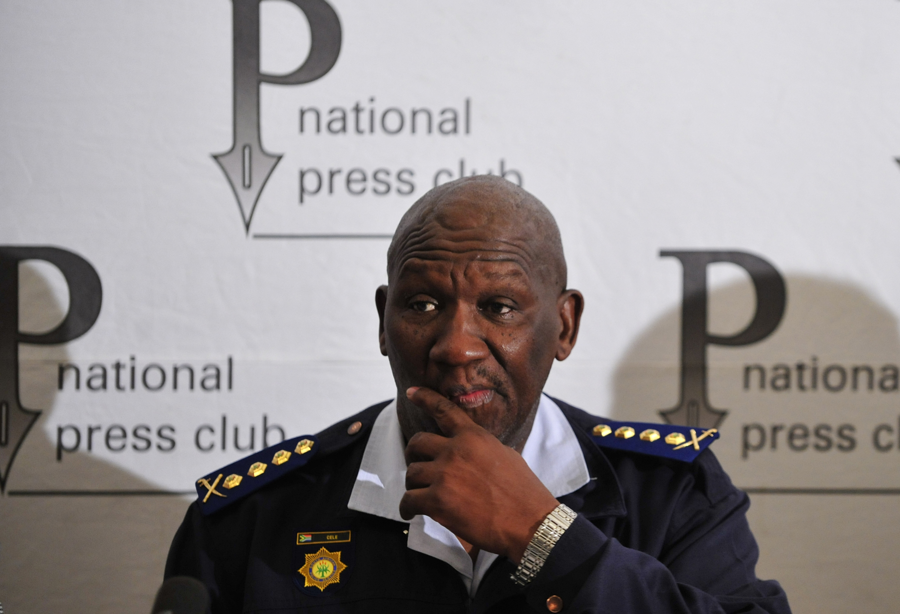 Pretória (África do Sul) - O comissário nacional da Polícia da África do Sul, general Bheki Cele, acusa jornalista britânico de complô contra o esquema de segurança da Copa do Mundo.